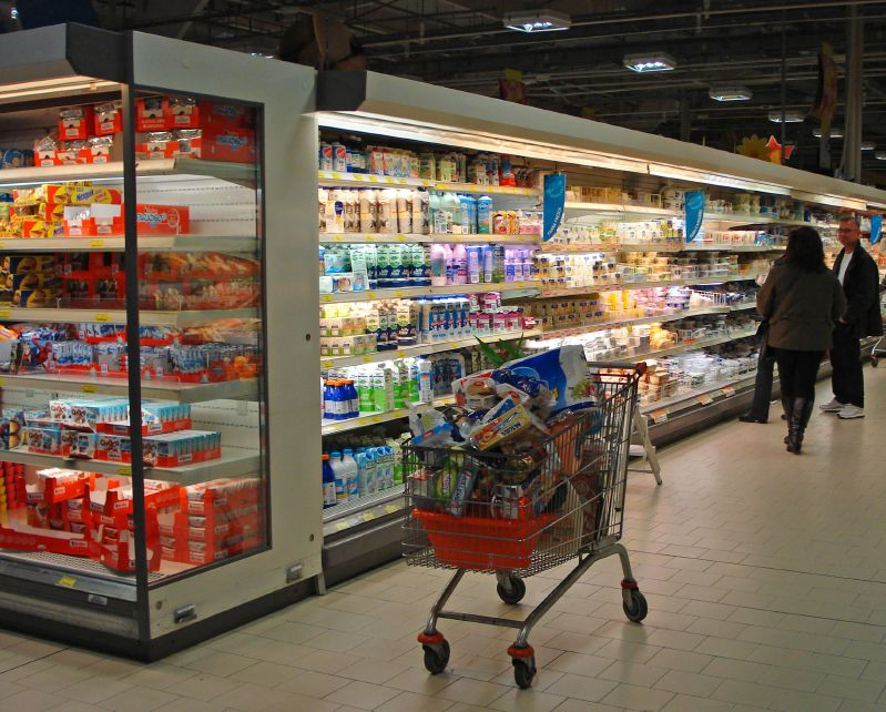 A large supermarket in Arezzo.